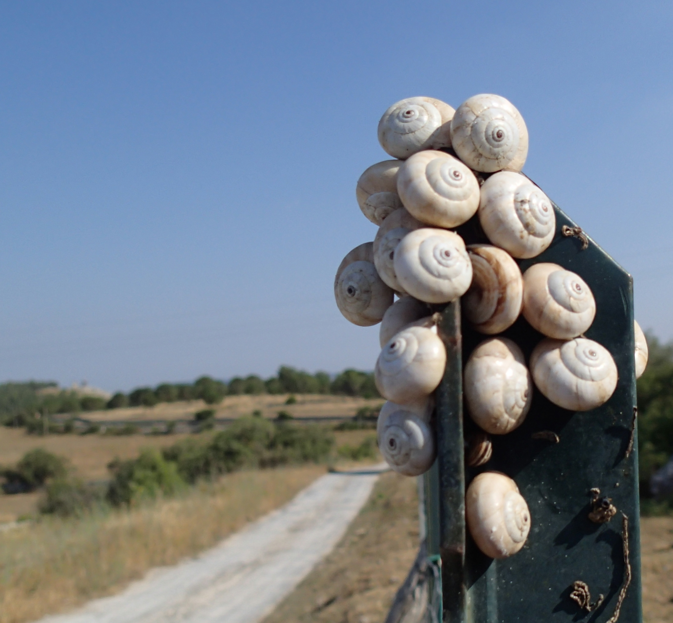 Lumache nei monti Iblei - Pantalica